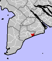 Bac Lieu District, Bac Lieu Province, Vietnam.